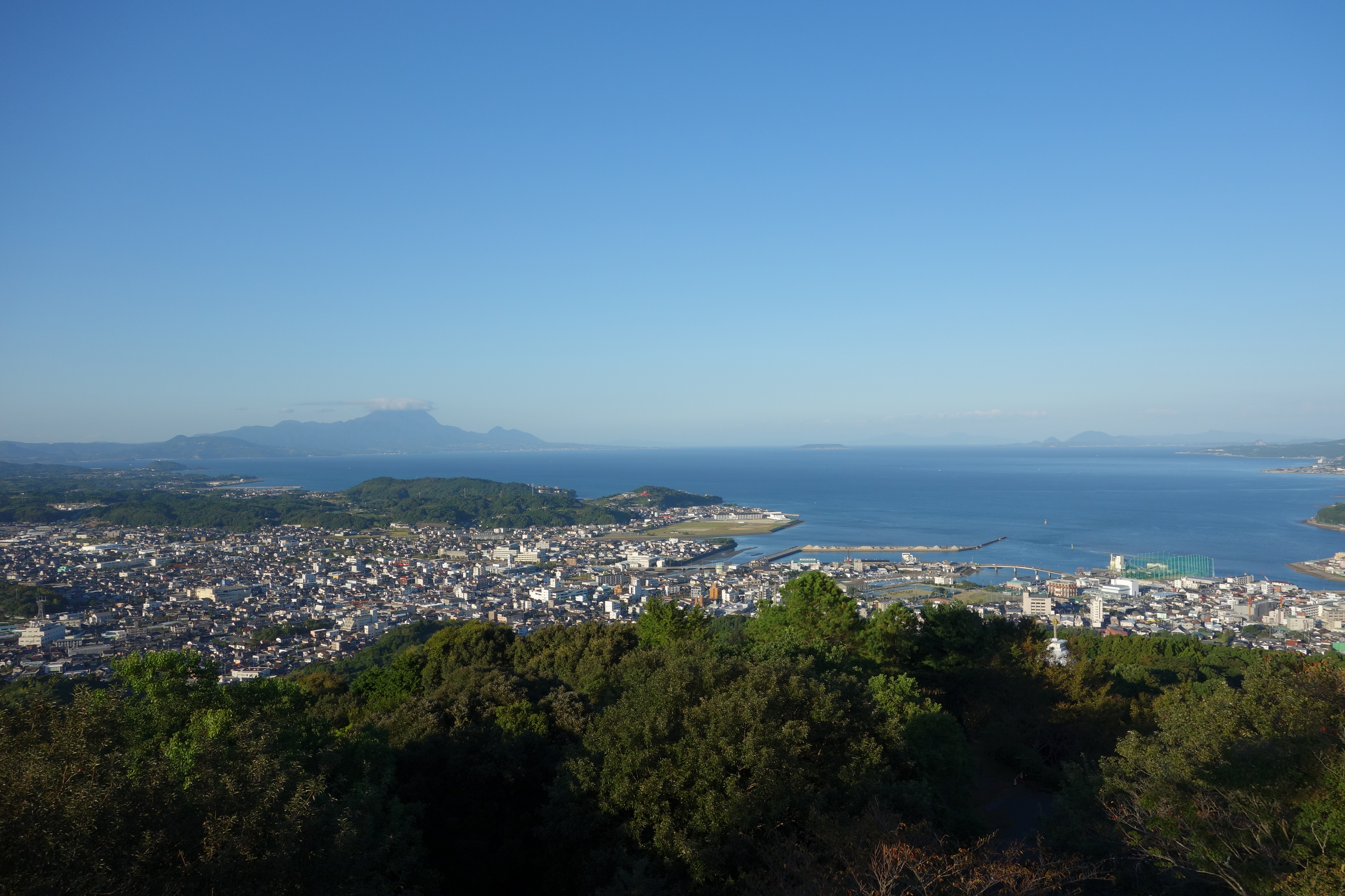 十万山から旧本渡市街